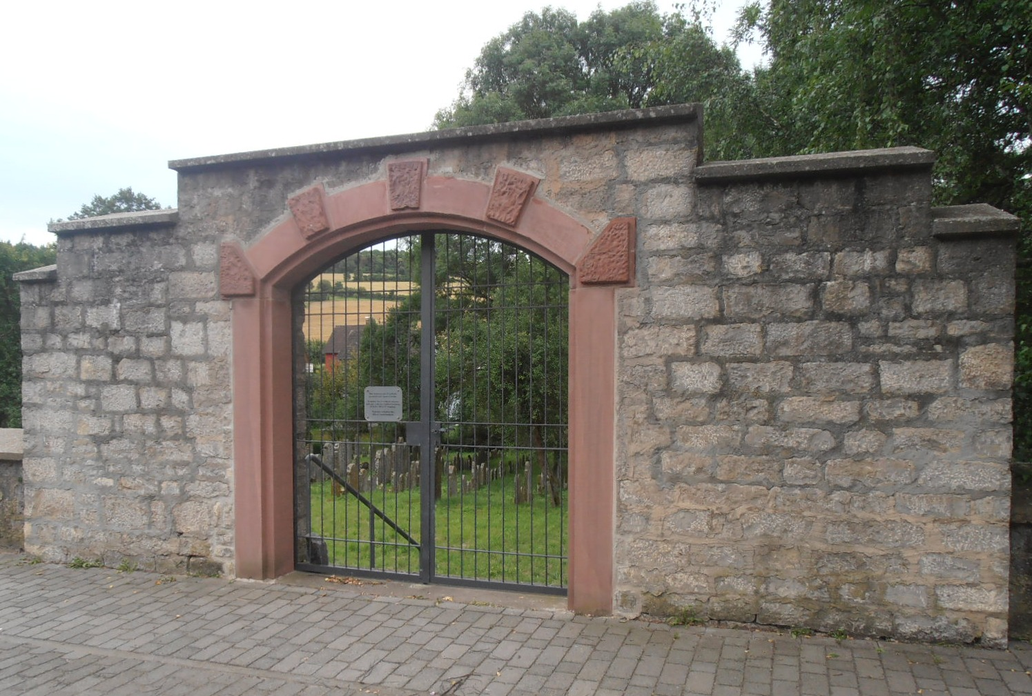 Eingangstoranlage zum jüdischen Friedhof Unterbalbach.